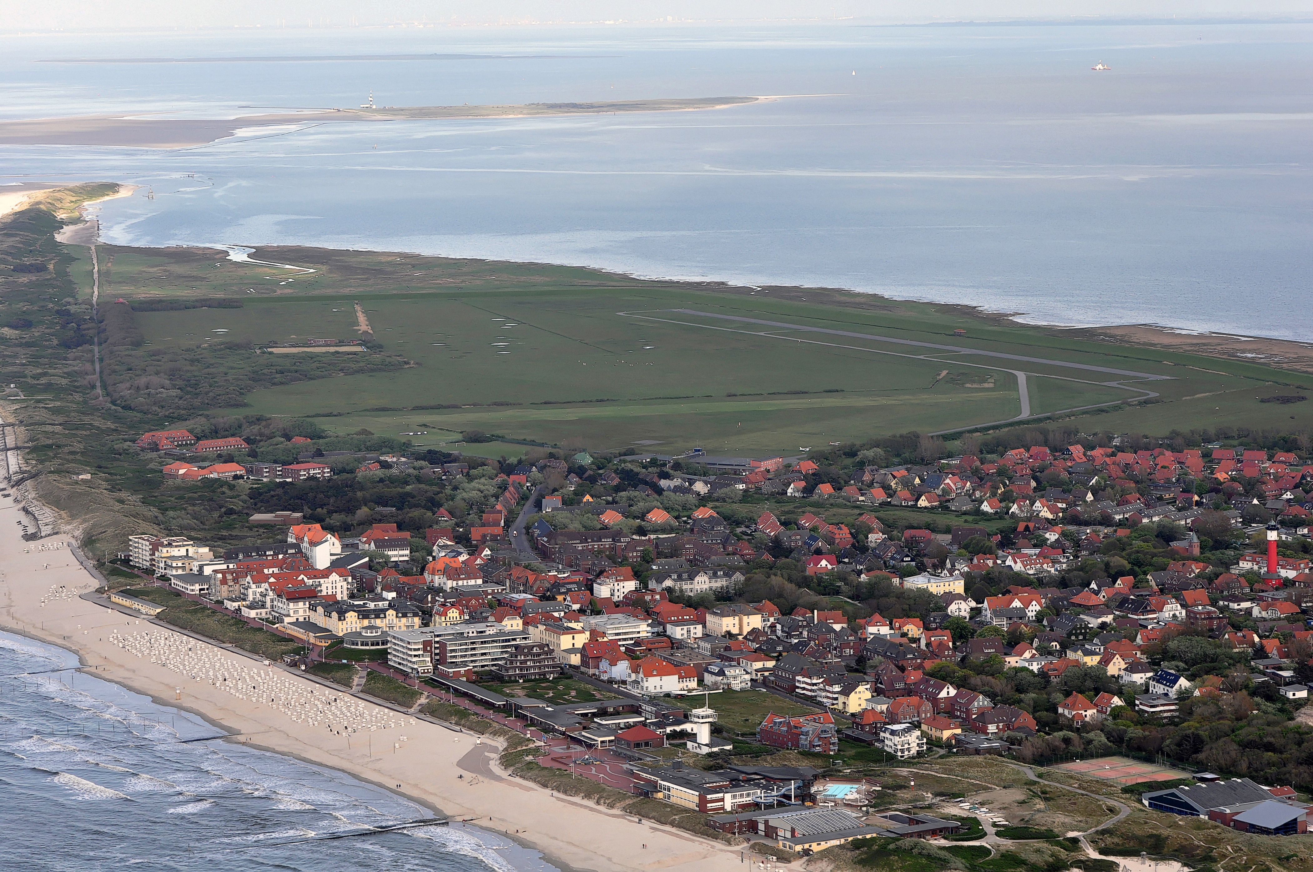 Luftbilder von der Nordseeküste 2012-05: Wangerooge